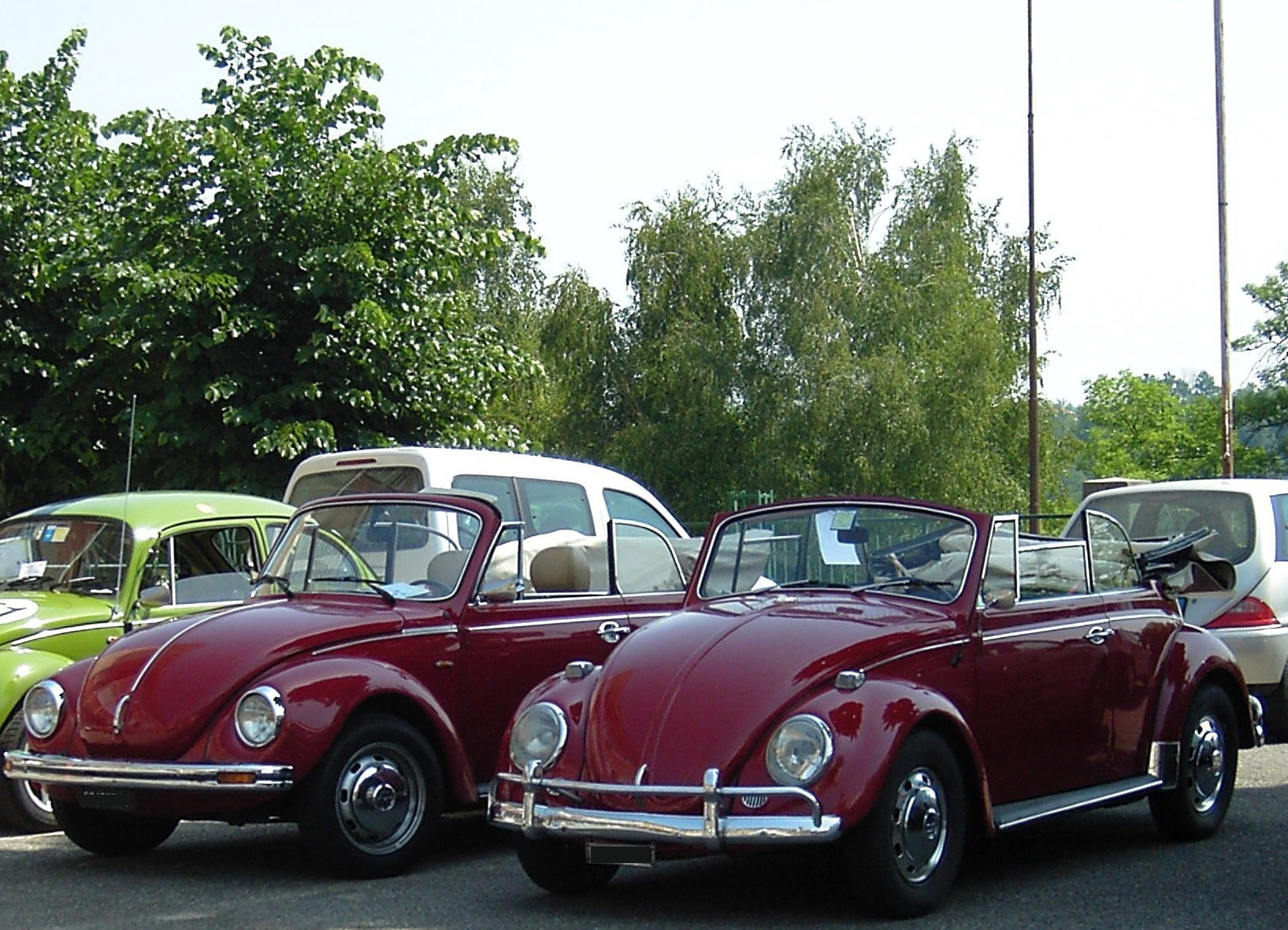 VW cabriolet Beetle and Superbeetle